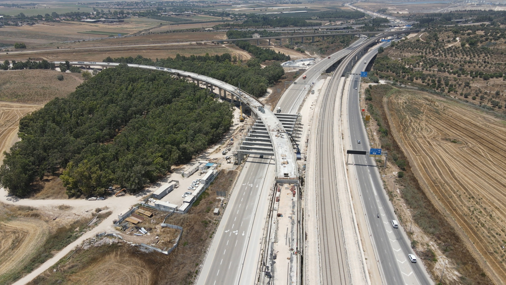 מחלף ענבה לכיוון מערב, בתחתית התמונה מתפצלת המסילה לשלושה כיוונים, ימין לכיוון תל אביב, שמאל לכיוון ירושלים וישר (בבנייה) לכיוון ראשון לציון